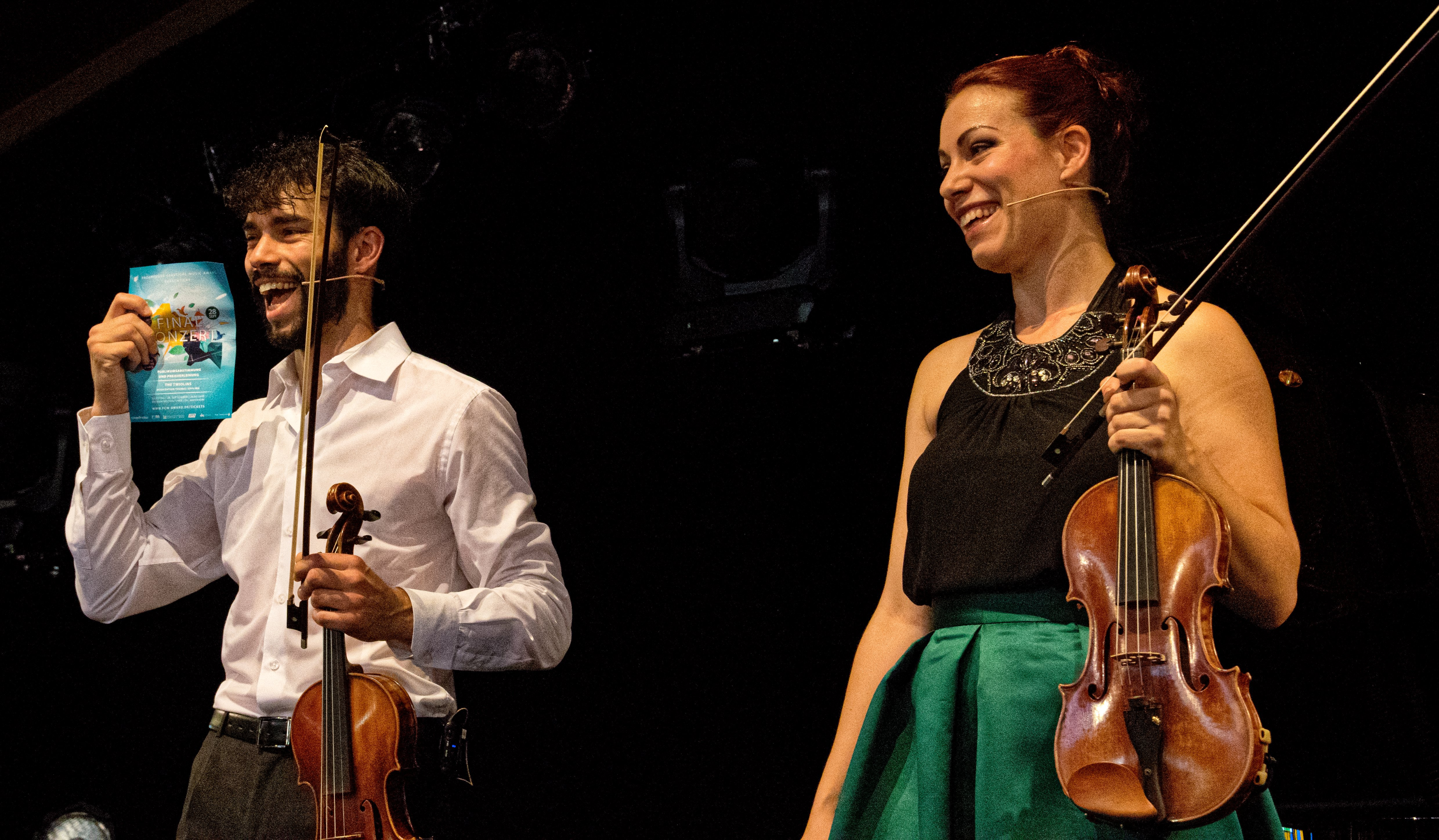 Bilder vom Zelt Musik Festival 2019 in Freiburg im Breisgau Hier die Matinee "Die_kleine_Fiesta"